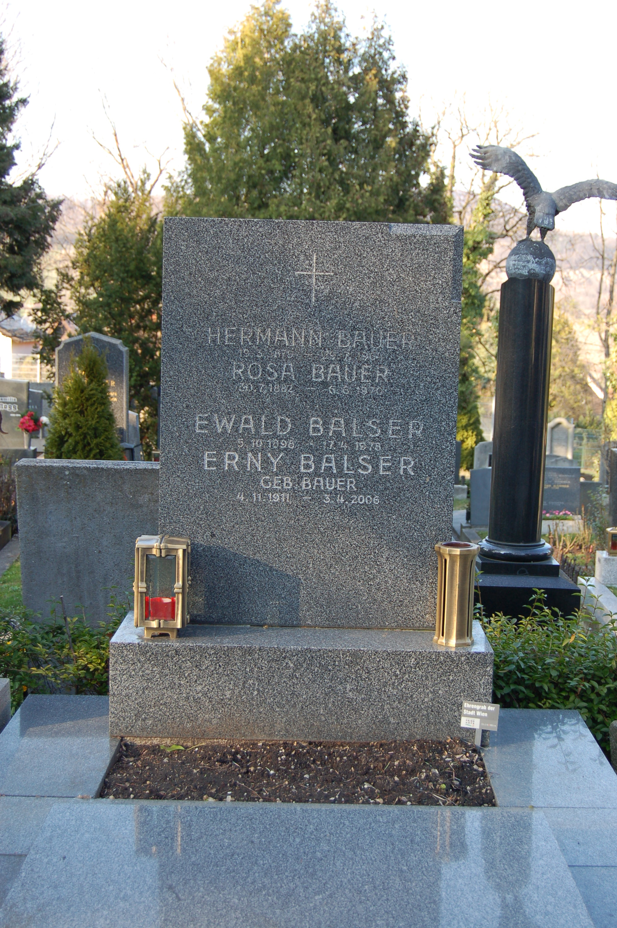 Neustifter Friedhof, Grabstätte von Ewald Balser (Ehrengrab der Stadt Wien)